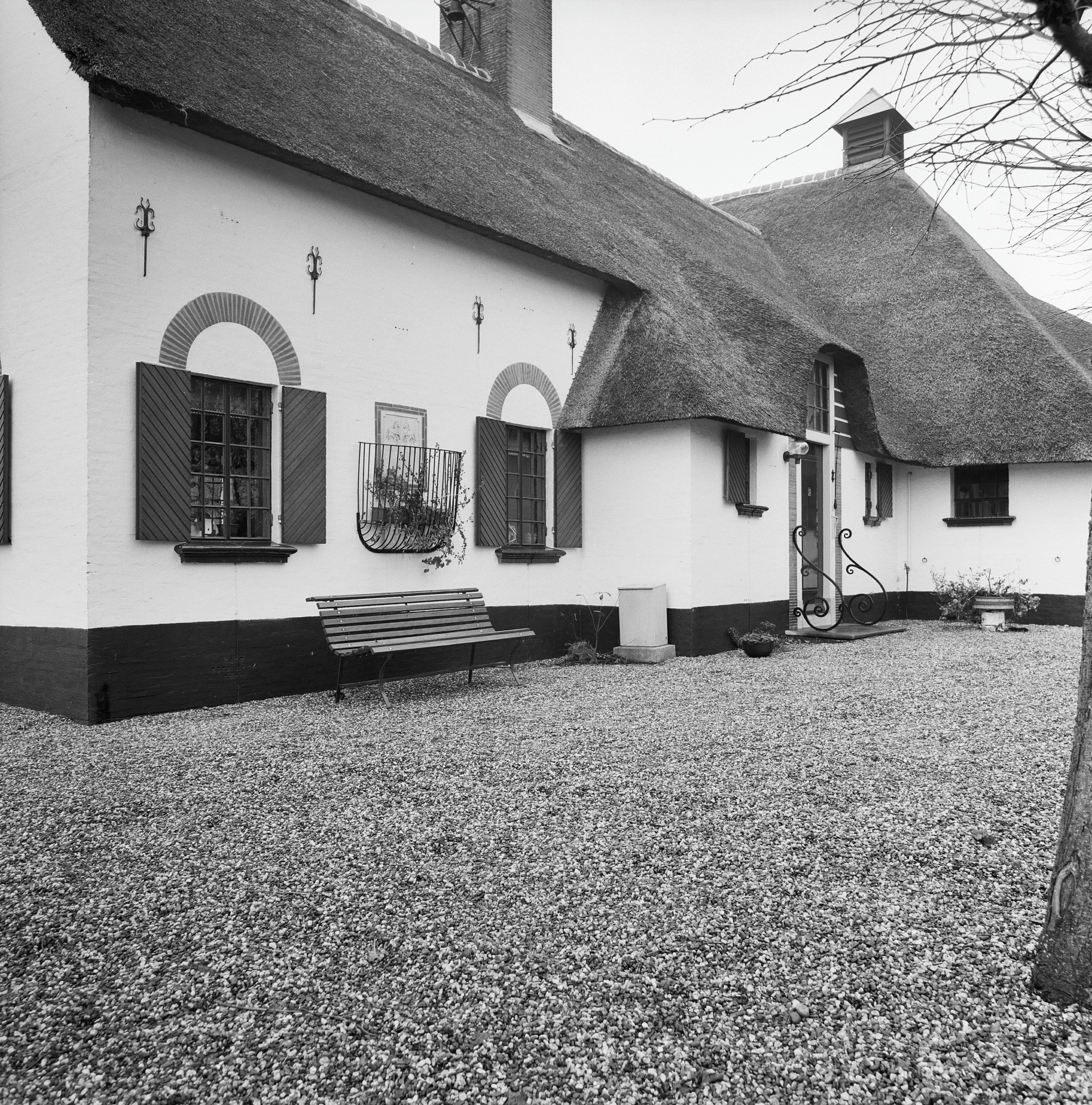 gedeelte voorgevel